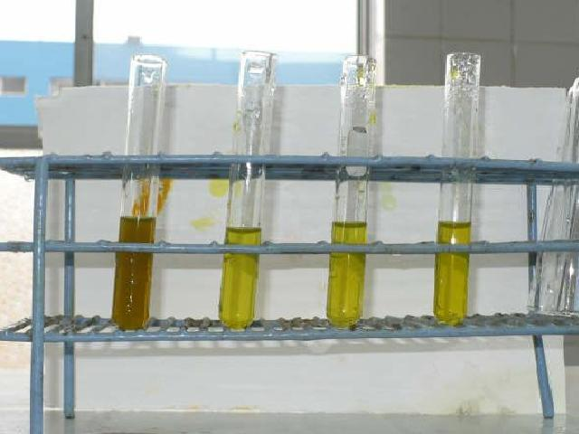 estudio farmacognostico